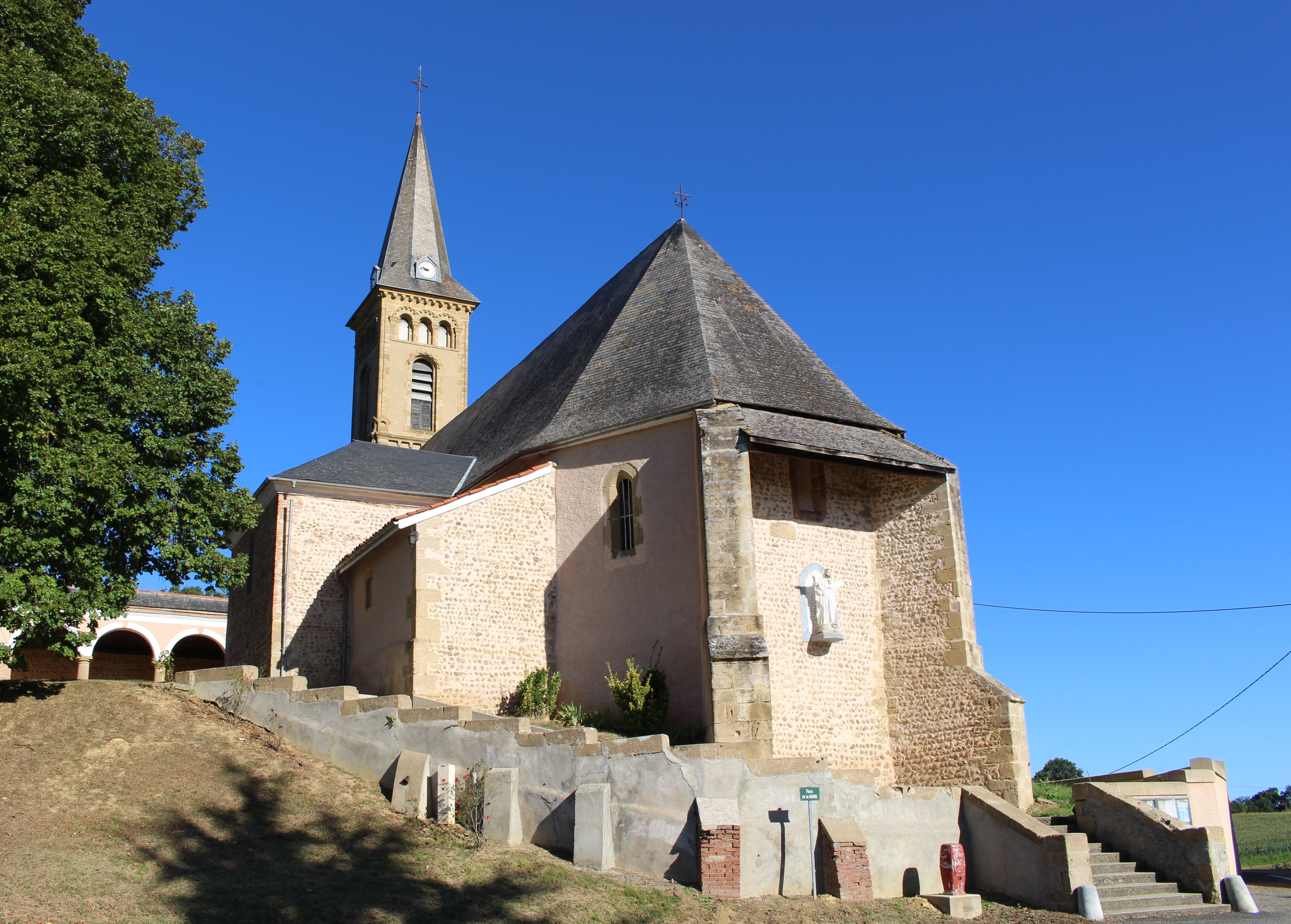 Église Exaltation-de-la-Sainte-Croix de Puydarrieux (Hautes-Pyrénées)